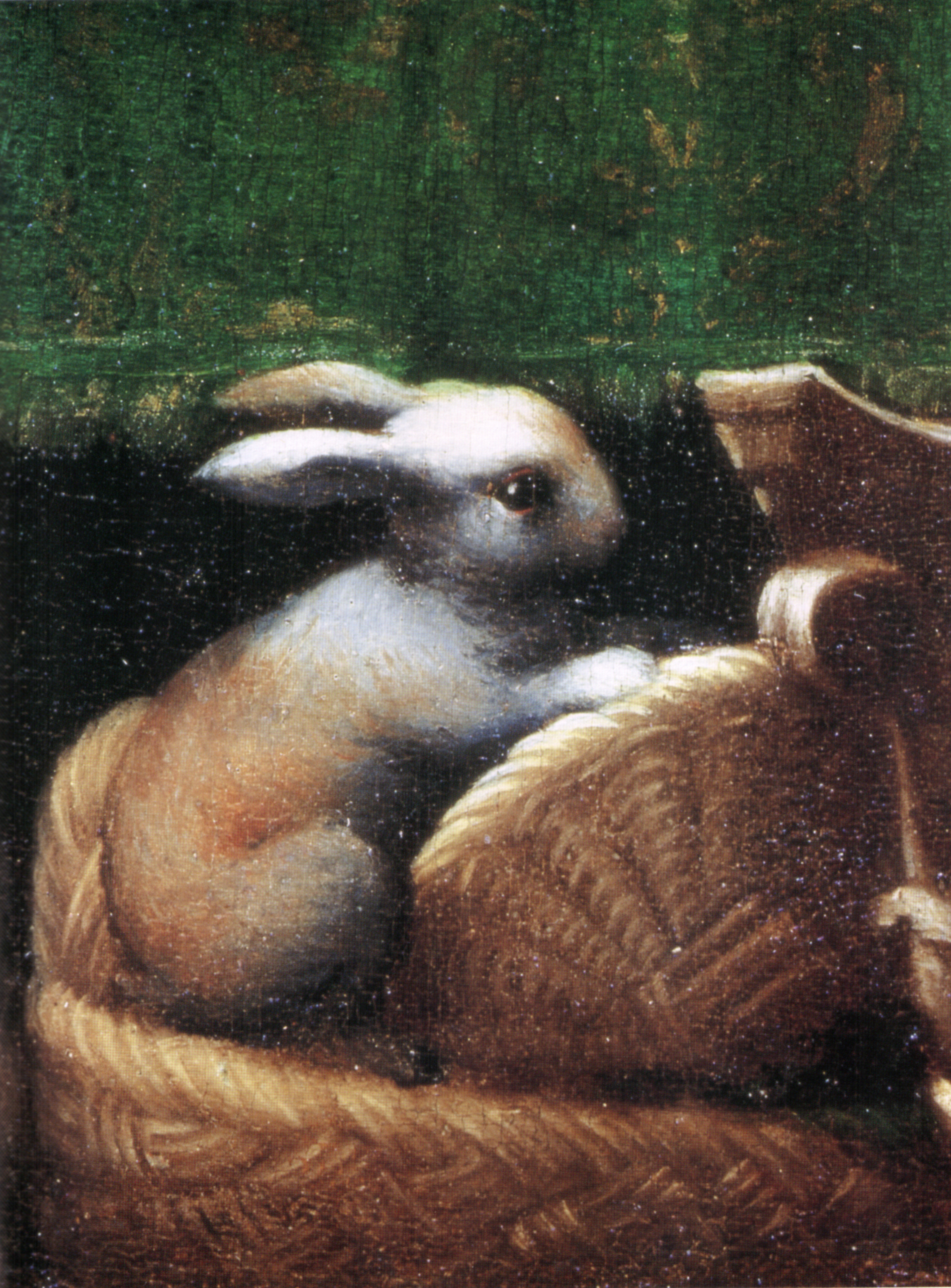 detail